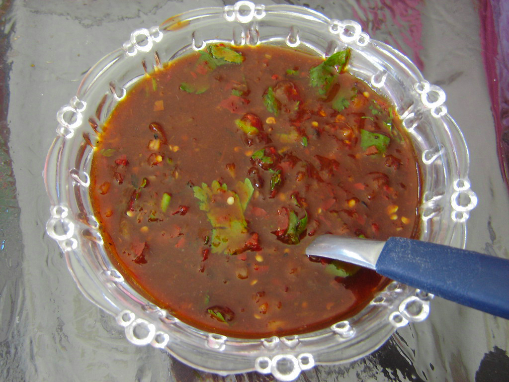 Salsa borracha. Ingredientes: - Chile pasilla - Tomate verde - Cilantro - Pulque